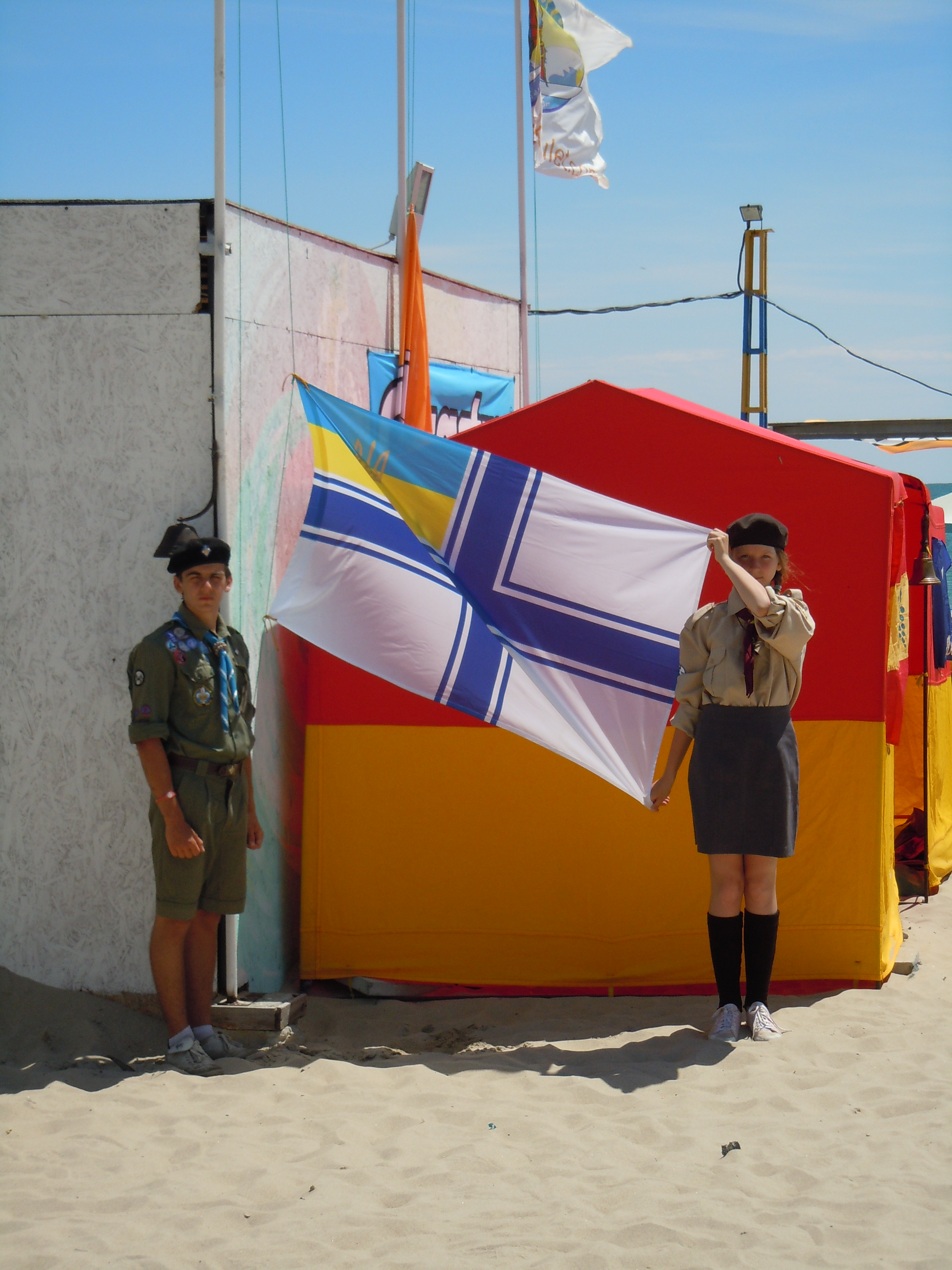 Зліт скаутів в Затоці, Одеська область